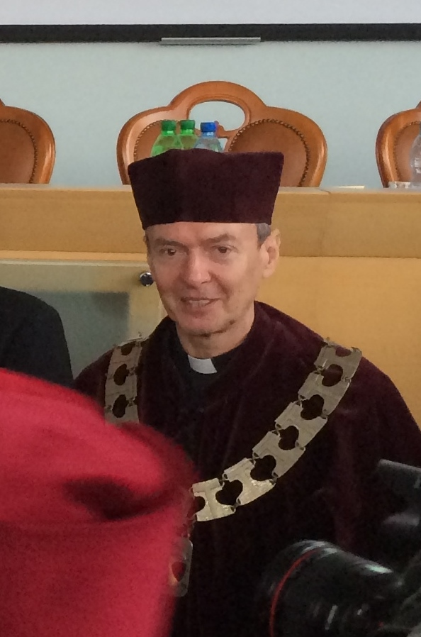 Ks. prof. Tadeusz Dola Opole 30-10-2014